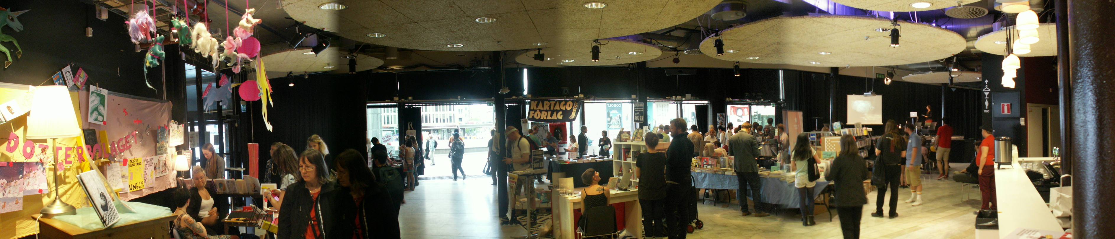 Panorama över Studion på Kulturhuset, i samband med Stockholms internationella seriefestival 2014.